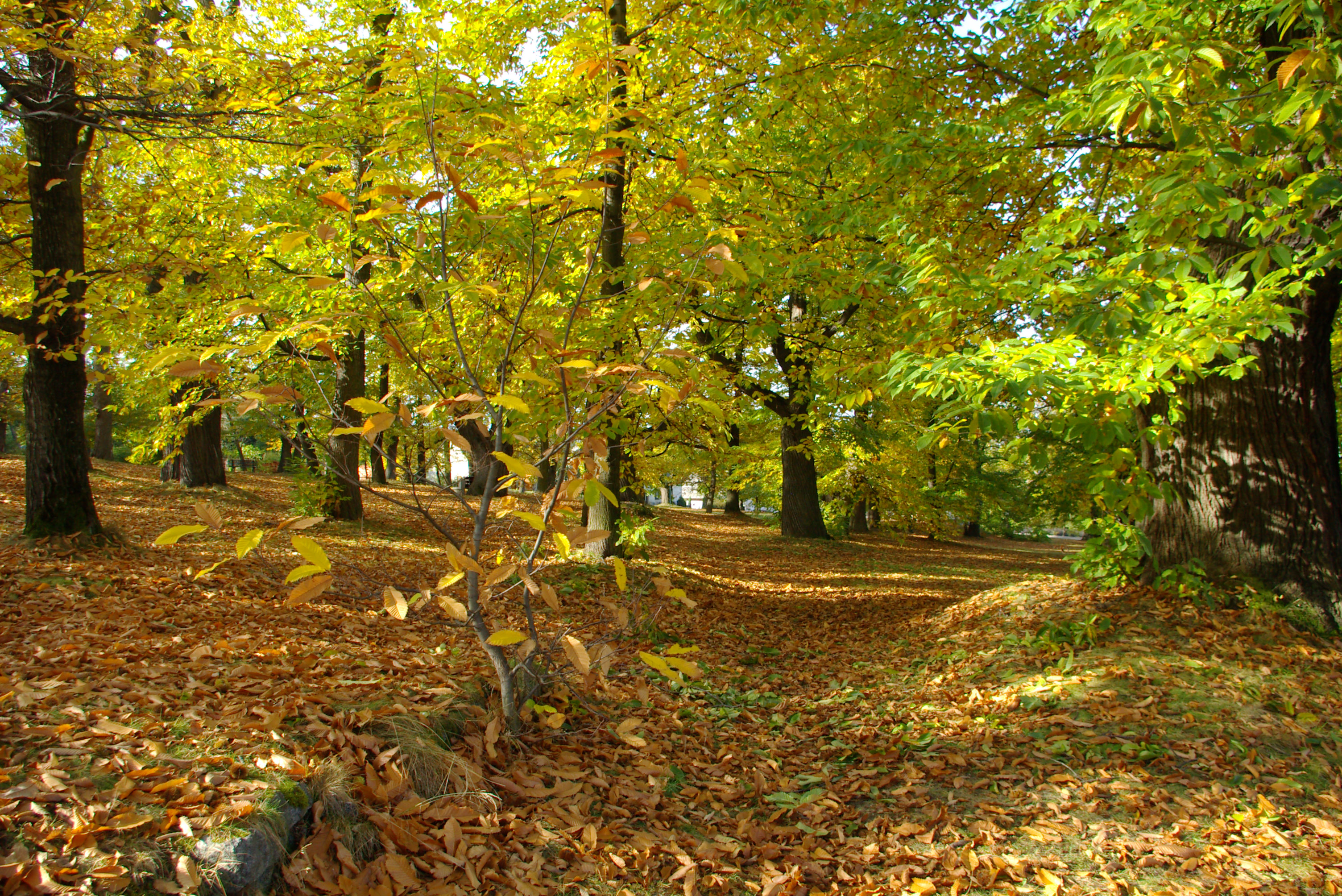 Vstup do kaštanky